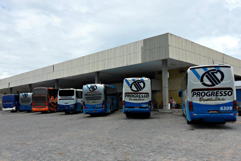 Rodoviária de Caruaru, Pernambuco